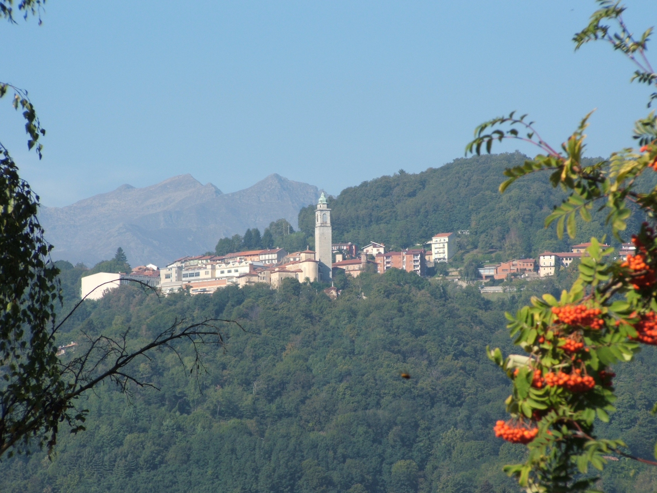 Pettinengo (provincia di Biella, Piemonte, Italia)